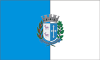 Bandeira do município deCabrália Paulista .